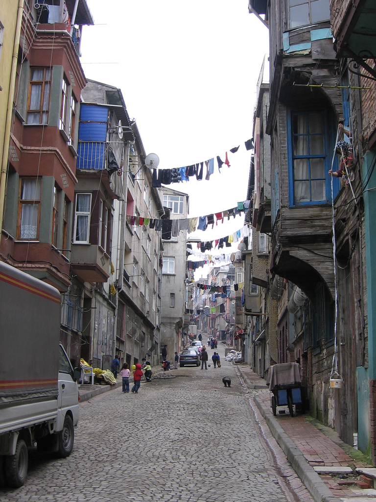 Balat, Istanbul